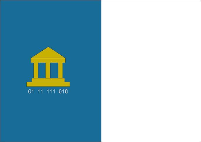 Bandera de Jun, en Granada (España)